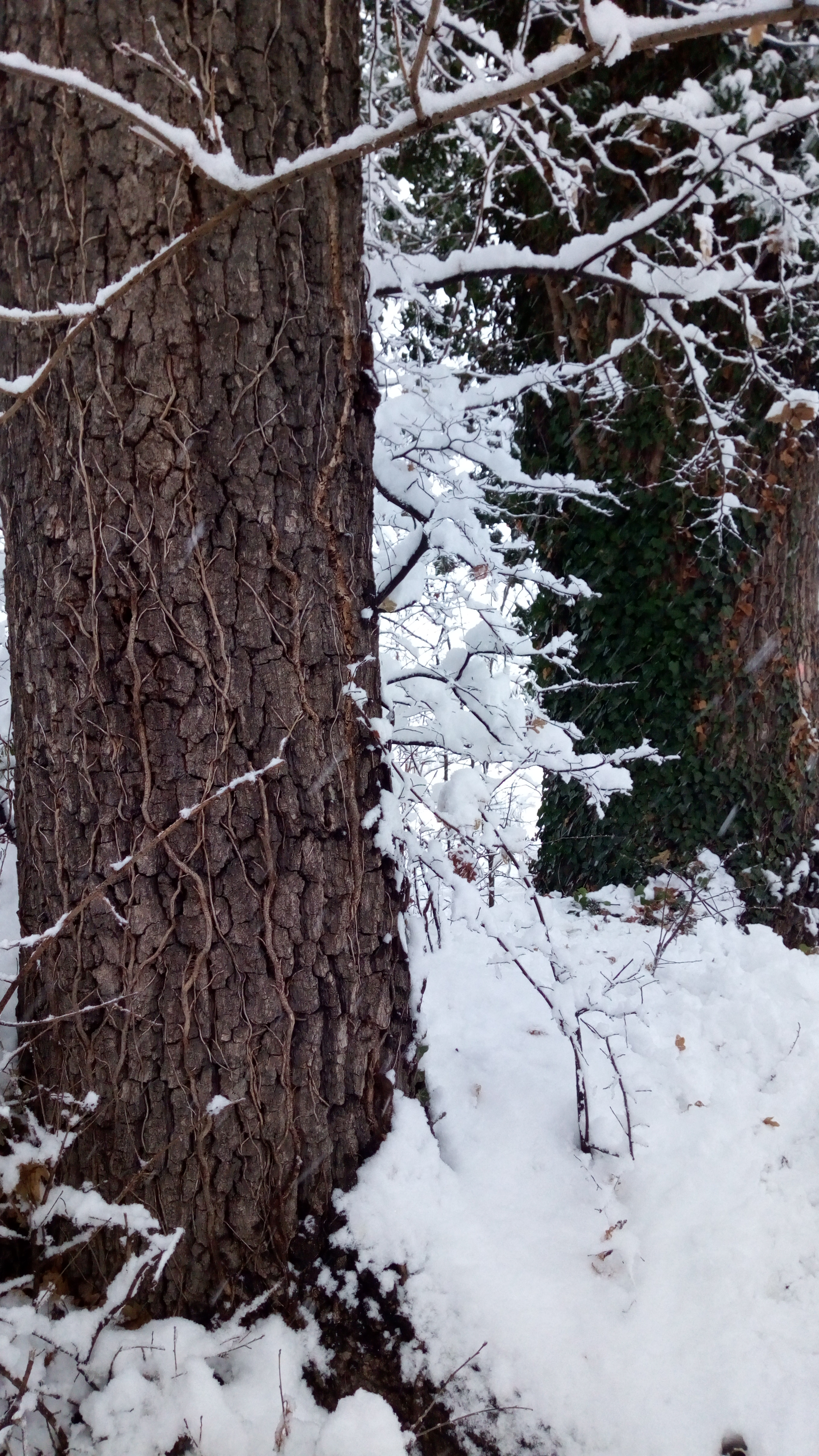 Вегетација Гибавца